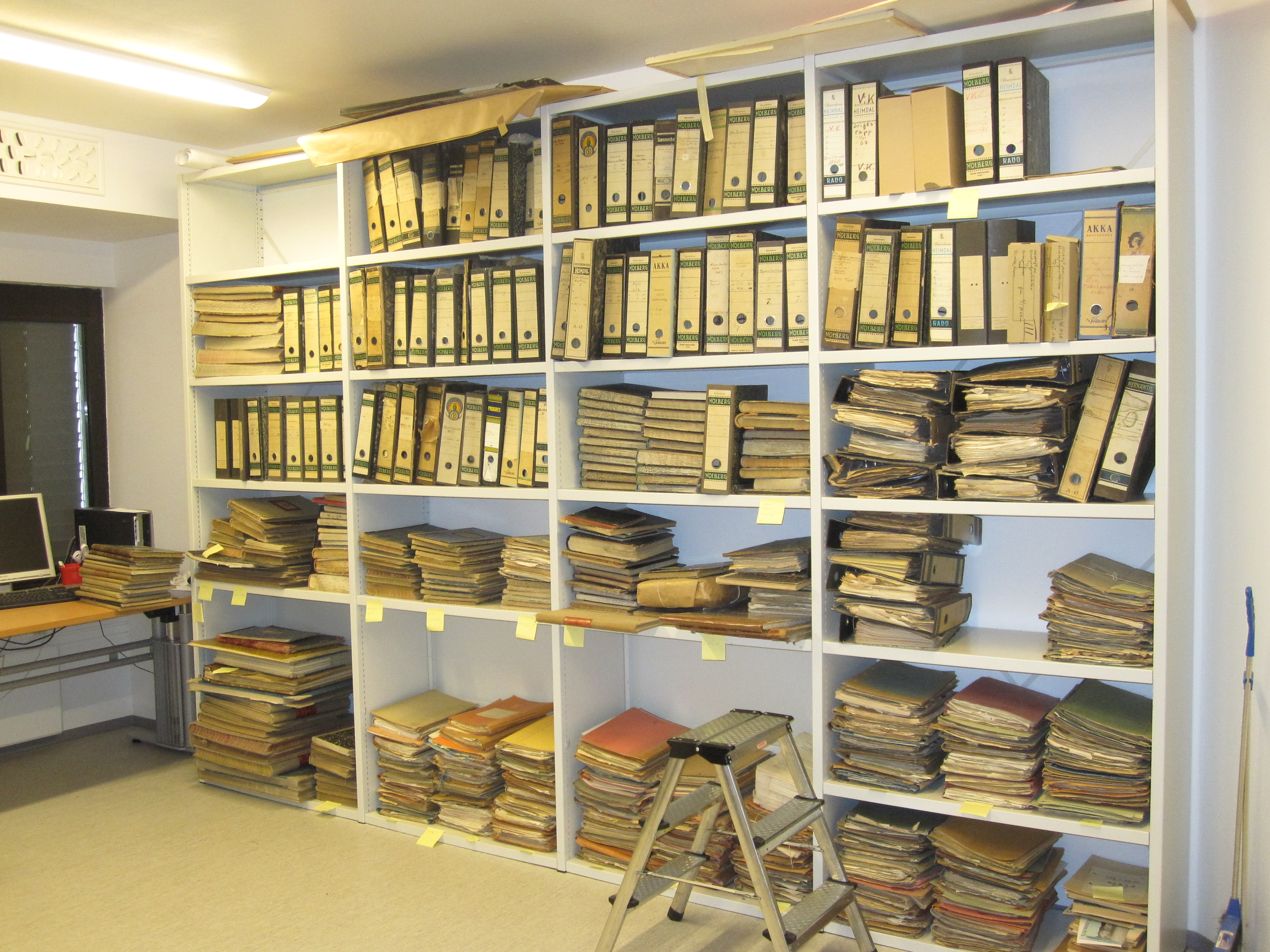 Arkivmaterialet komme på fylkesarkivet i 2011